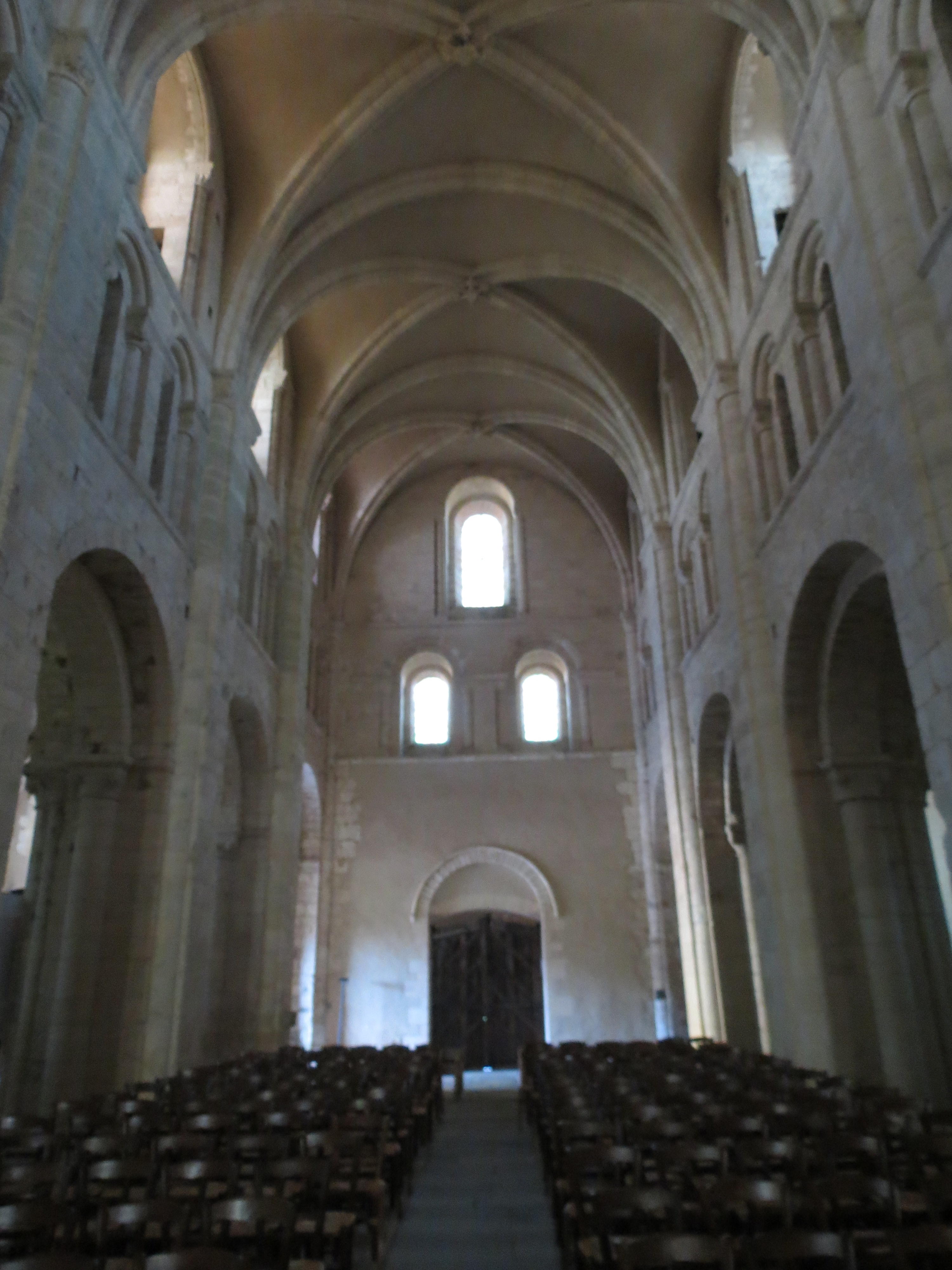 Abbaye de Lessay - revers du portail occidental